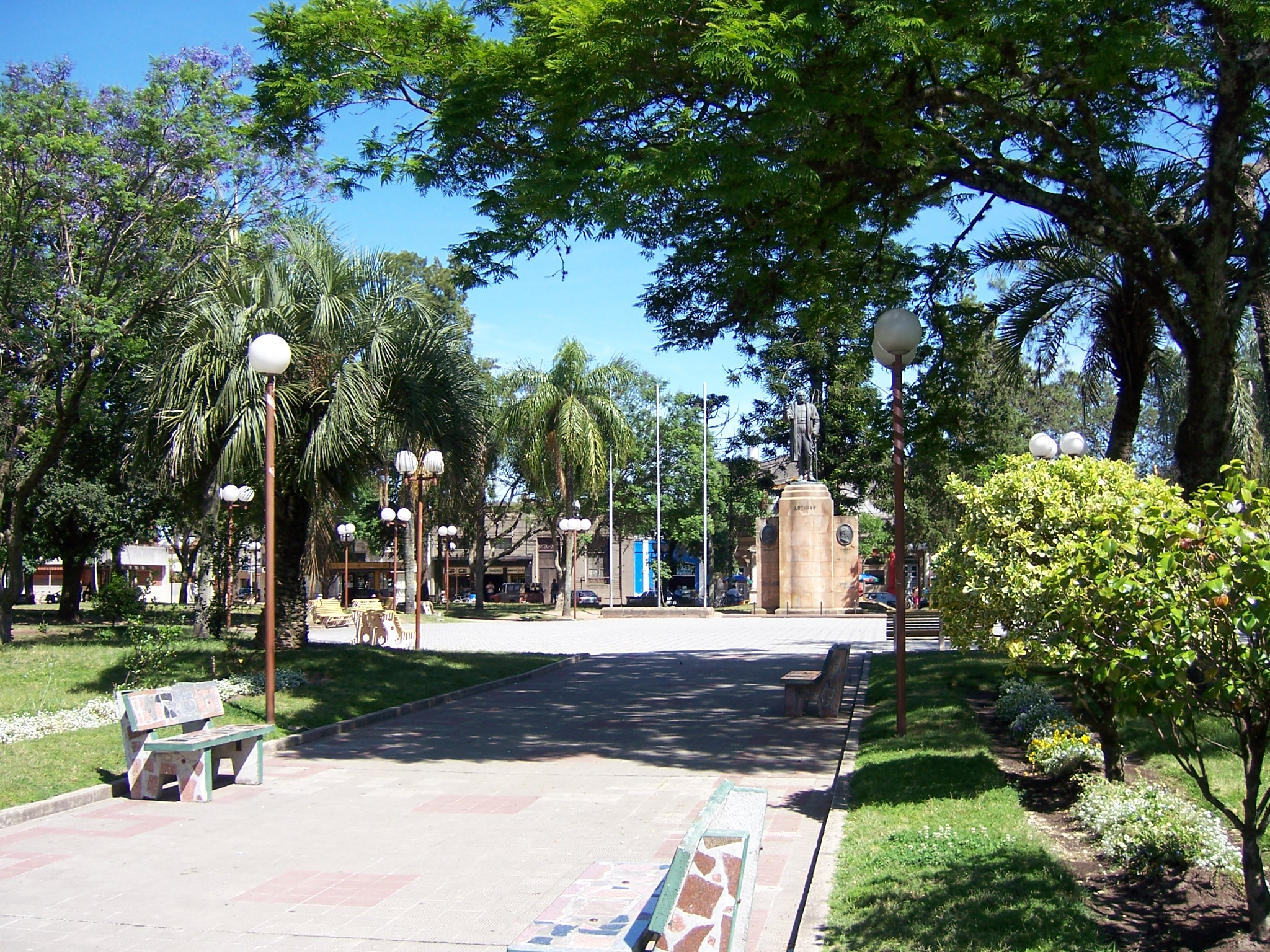 Tacuarembó, Uruguay, vista de la Plaza 19 de Abril.